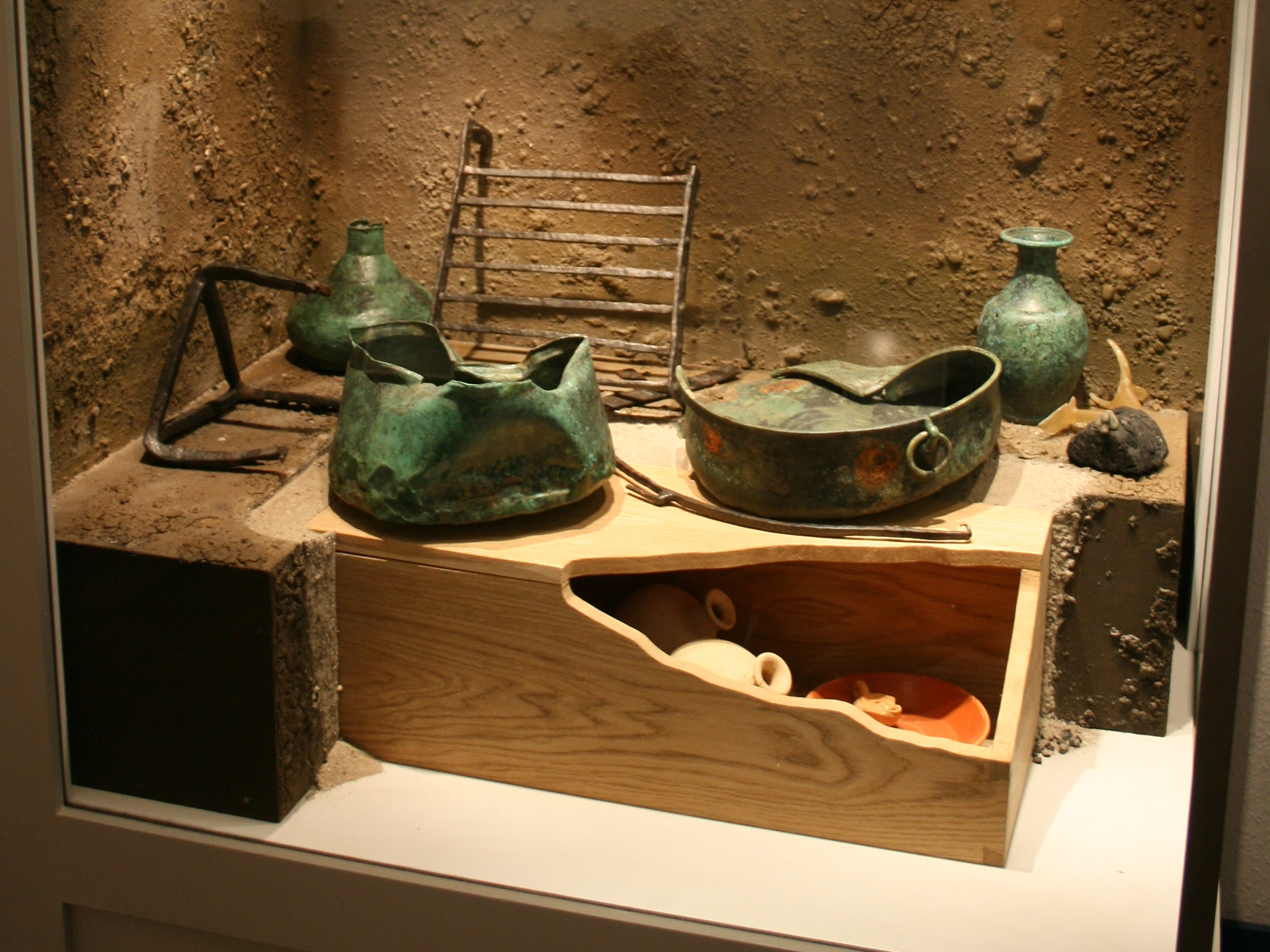 Grabinventar aus dem Gräberfeld einer Villa rustica bei Wölfersheim-Wohnbach im Wetterau-Museum Friedberg. Mit freundlicher Genehmigung des Museums.